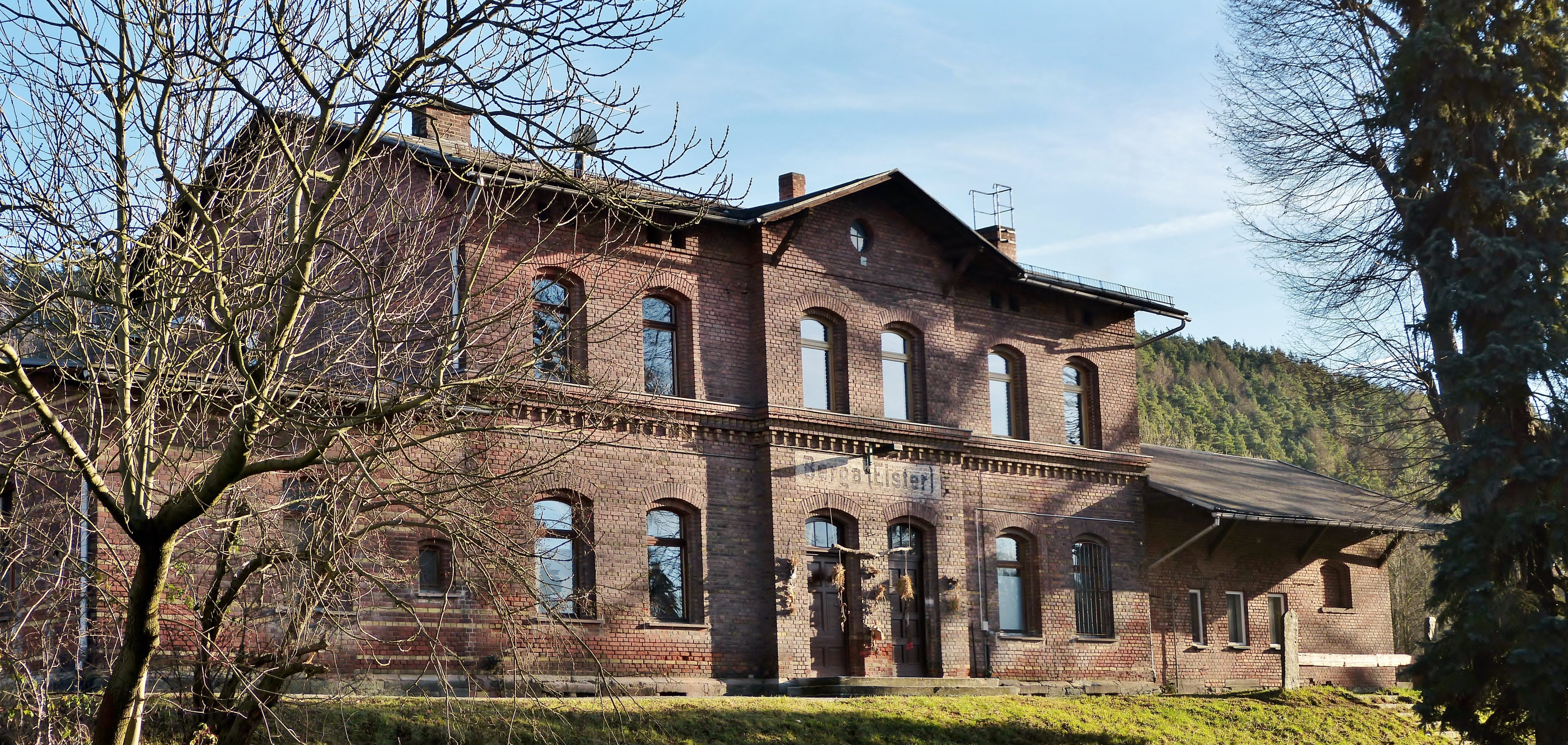 Bahnhofsgebäude in Berga/Elster